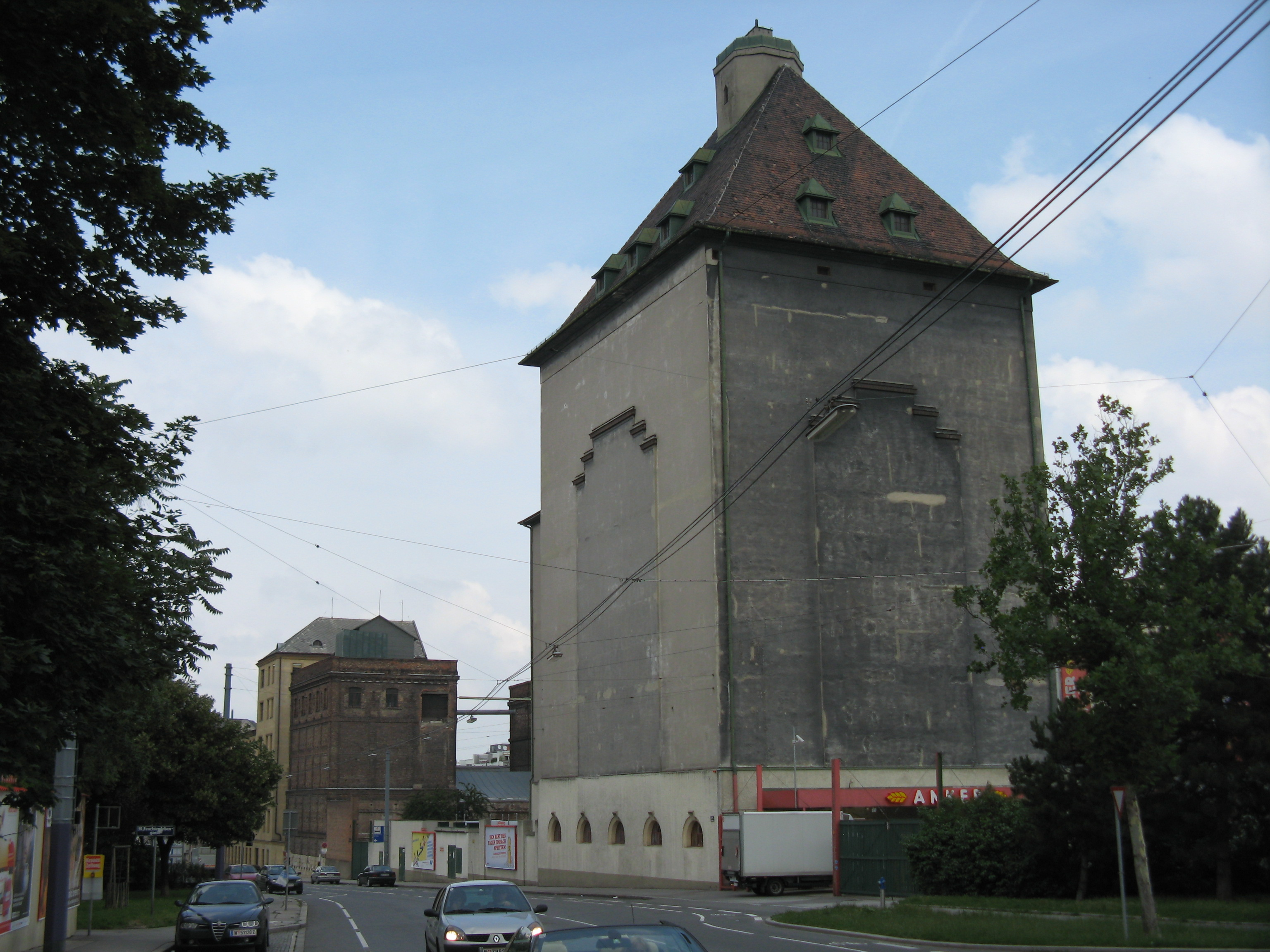 Neuer Getreidesilo (1926/27), Ankerbrot-Fabrik, Absberggasse 35, Wien-Favoriten